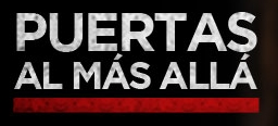 Por favor este es mi propio trabajo